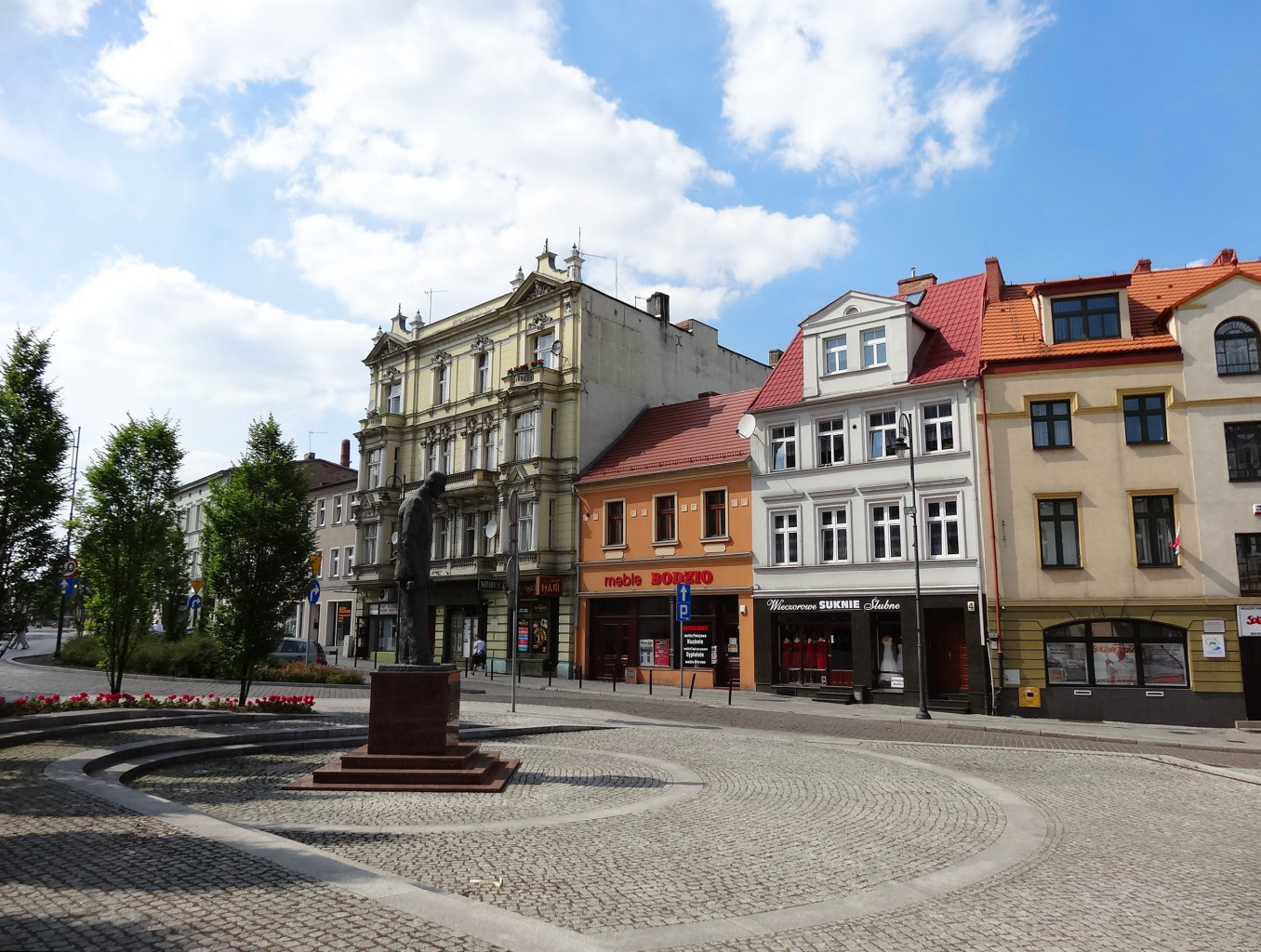 Wełniany Rynek w Bydgoszczy